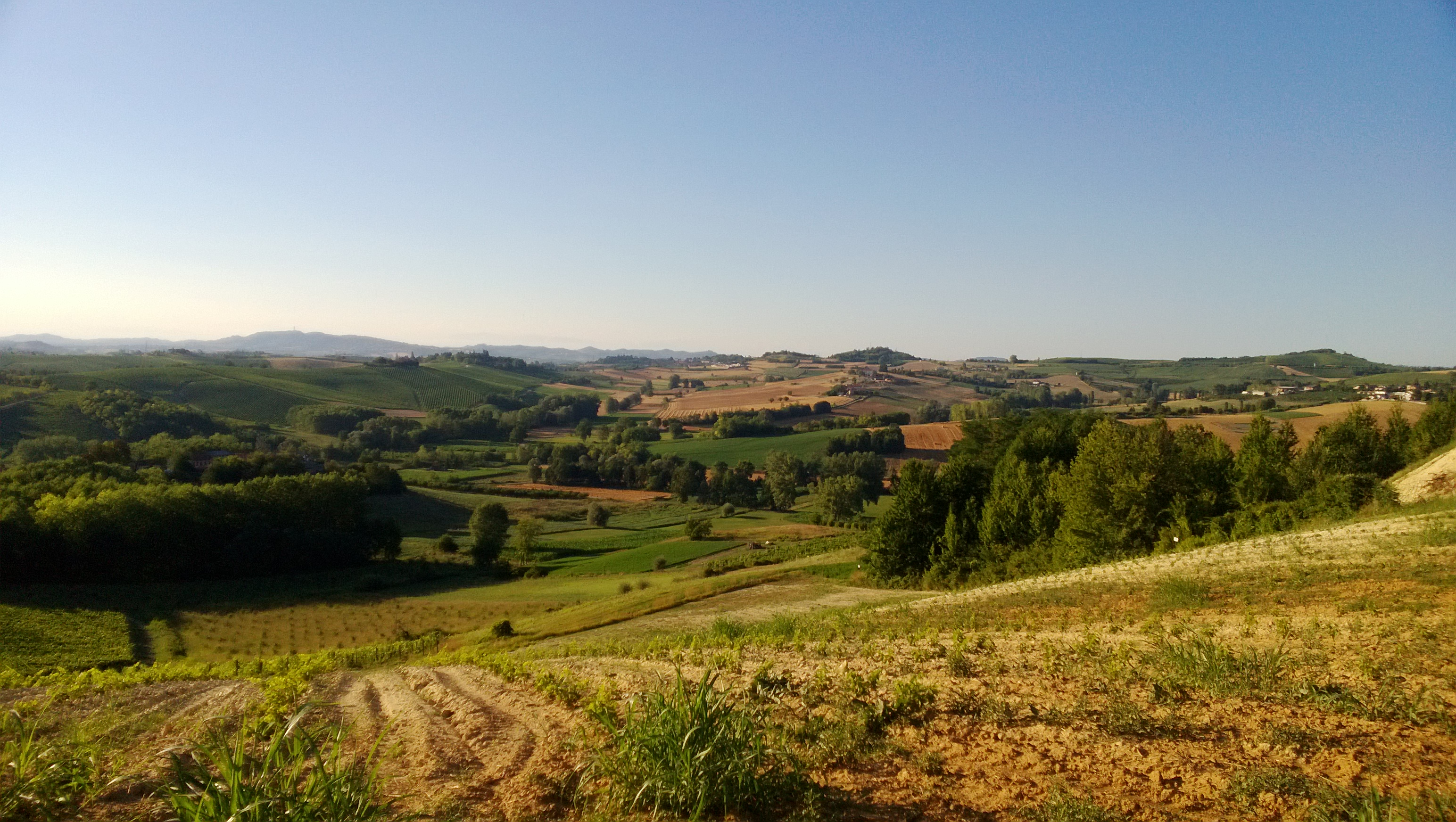 Panorama delle colline astigiane nel comune di Portacomaro (AT), Italia.